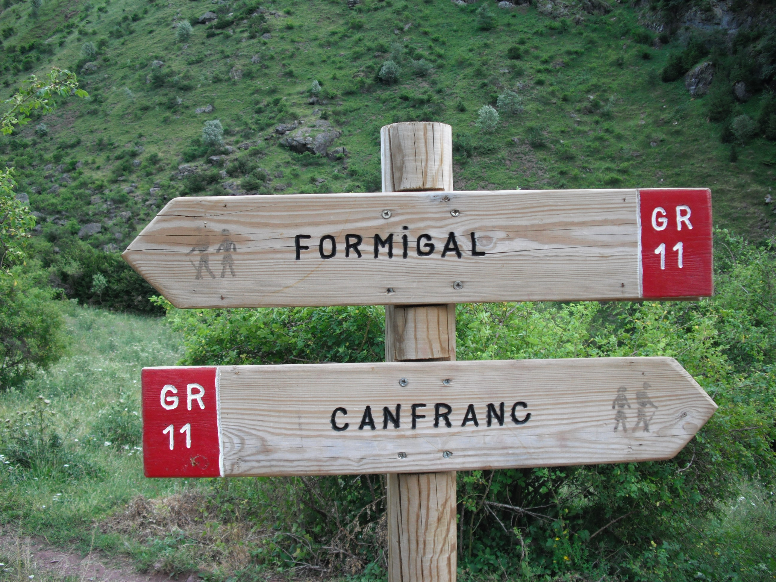 Cartel de la GR-11 con direcciones a Canfranc o Formigal en Canal Roya, Huesca.